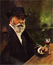 Мориц Буш